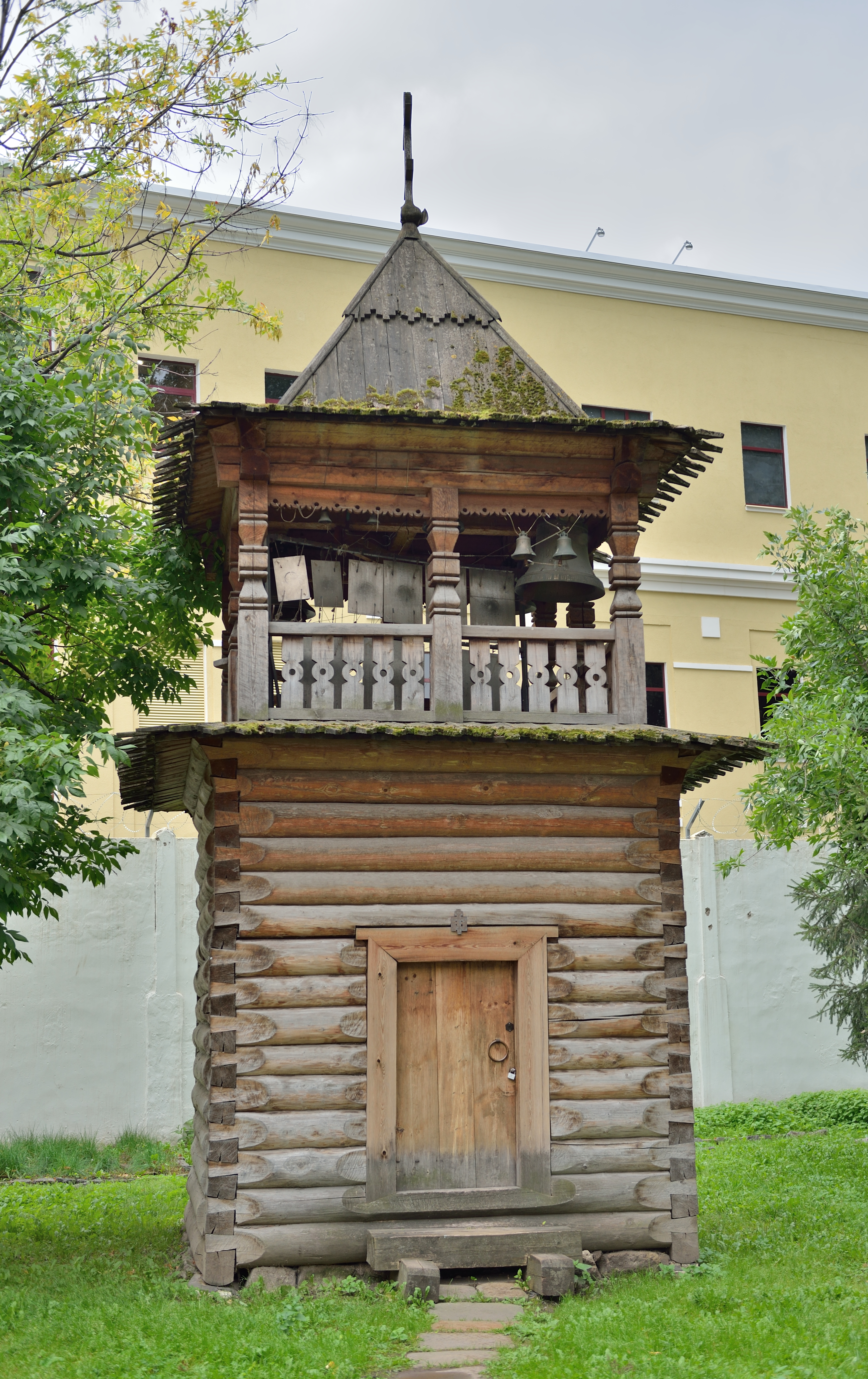 Деревянная звонница на месте снесенной